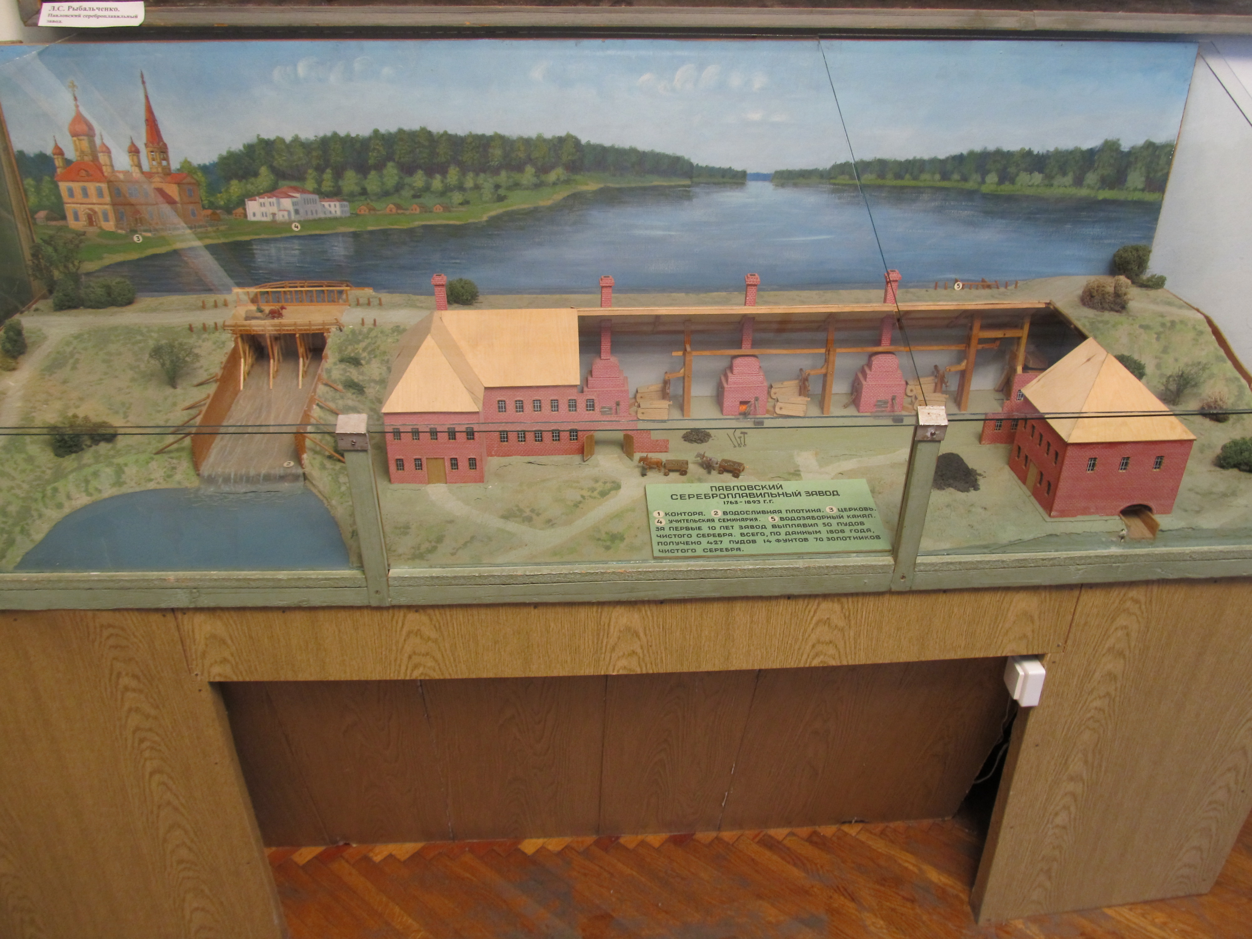 Макет Павловского сереброплавильного завода расположенный в Музее истории Павловского района